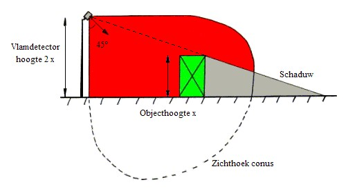 Vlammenmelder, Zichthoek Dutch, Jan Nijkamp, Sense-WARE Fire and Gas Detection BV